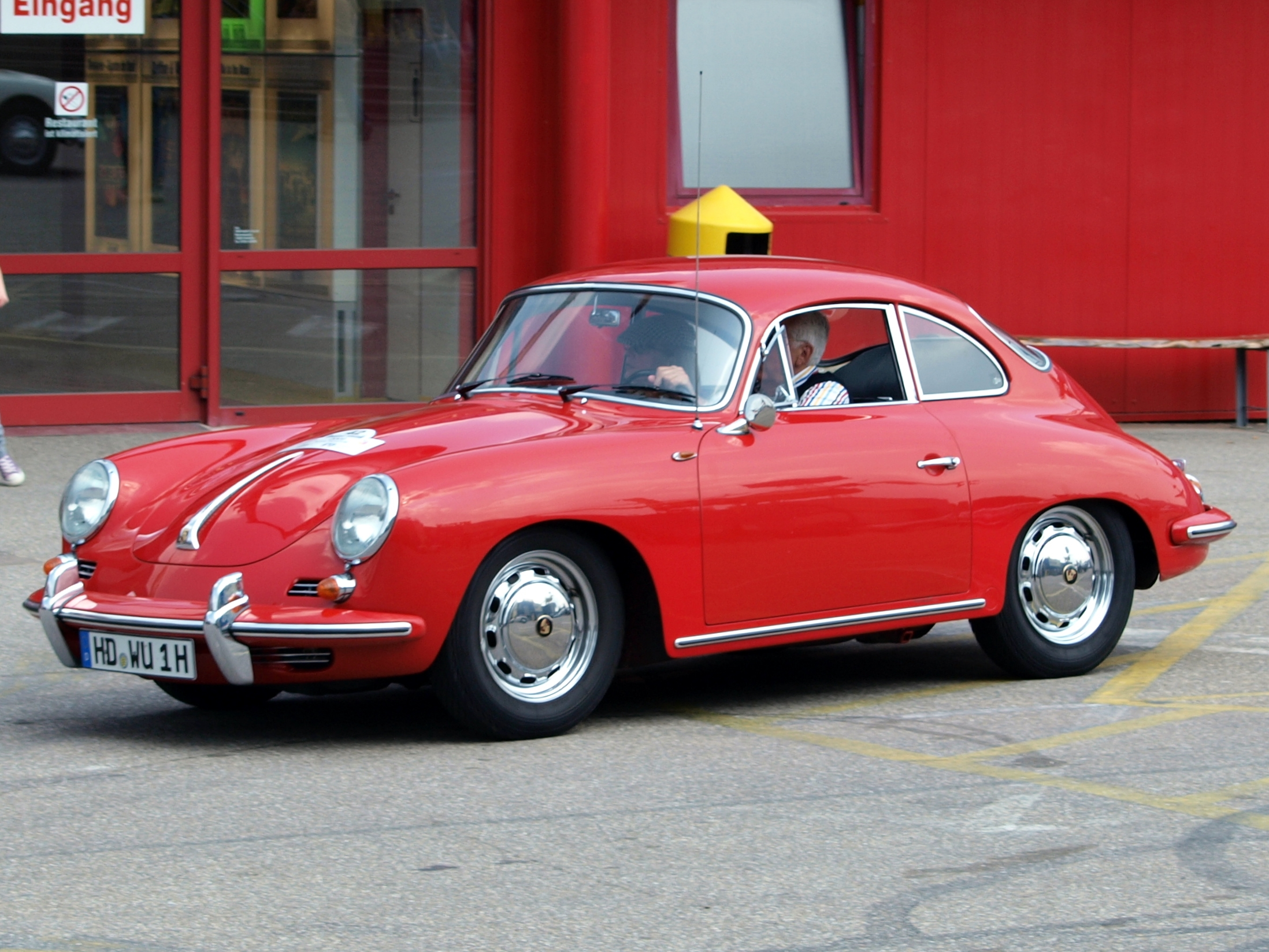 Photographed at the Technik museum Sinsheim, Germany. Participating in the Kurpfalz-Klassik rund um die 1. Tankstelle der Welt.